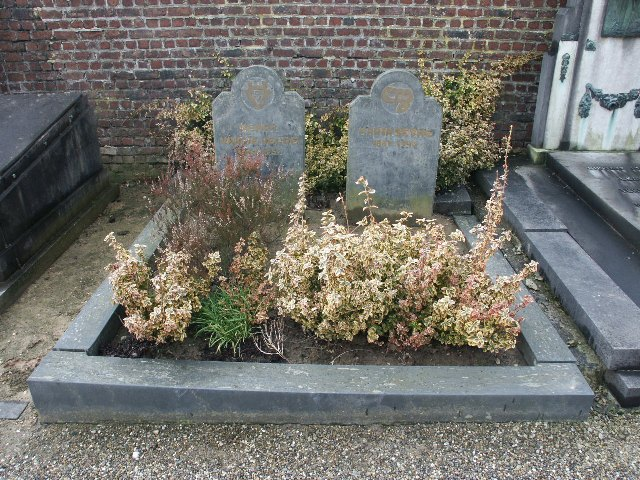 Tervuren Duisburgsesteenweg Graf Henry van de Velde This is a possible Onroerend Erfgoed: Find the monument in the Monuments database: Unknown street in Tervuren All Onroerend Erfgoed in Tervuren Is this Onroerend Erfgoed? Yes No More images to work at in Category:Possible onroerend erfgoed.